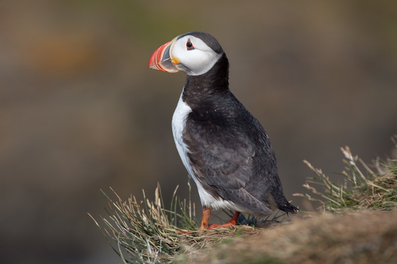 An Atlantic puffin (Fratercula arctica).